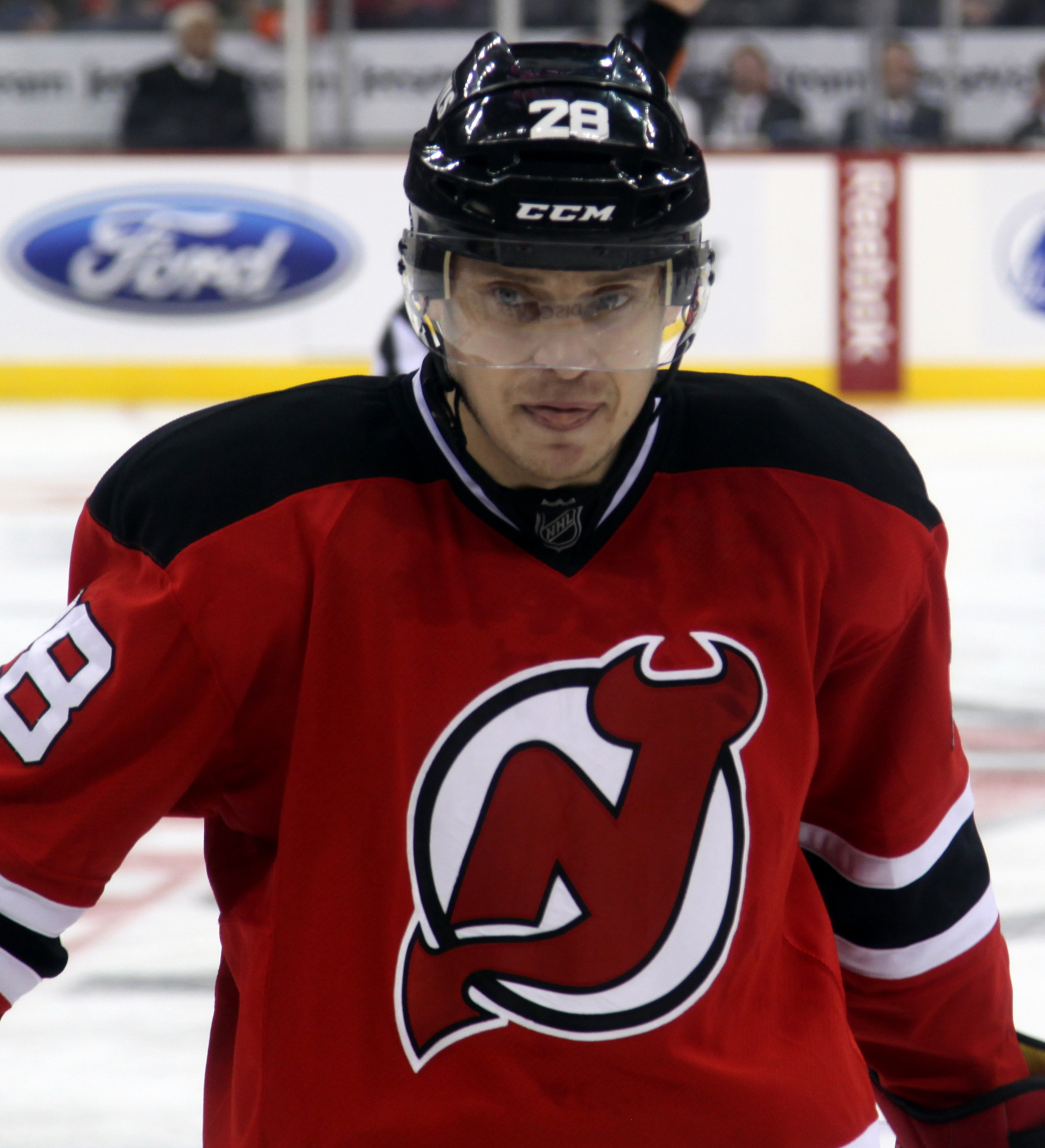 Volchenkov in 2013.